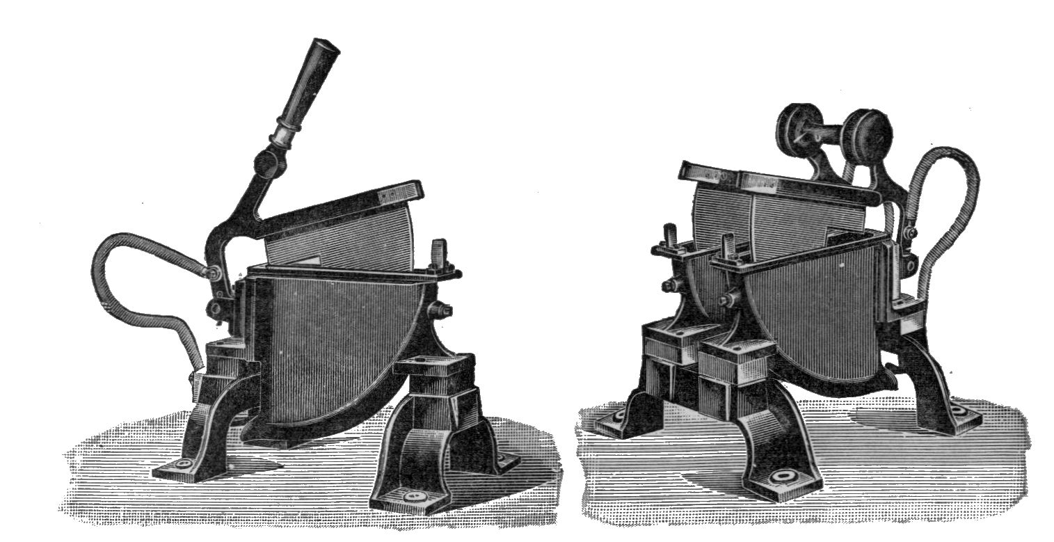 Fig. 444 Liquid Switches (Berend)